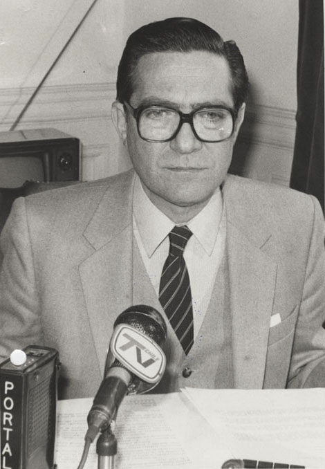 Jaime del Valle Alliende, Ministerio de Relaciones Exteriores de Chile entre 1983 y 1987.